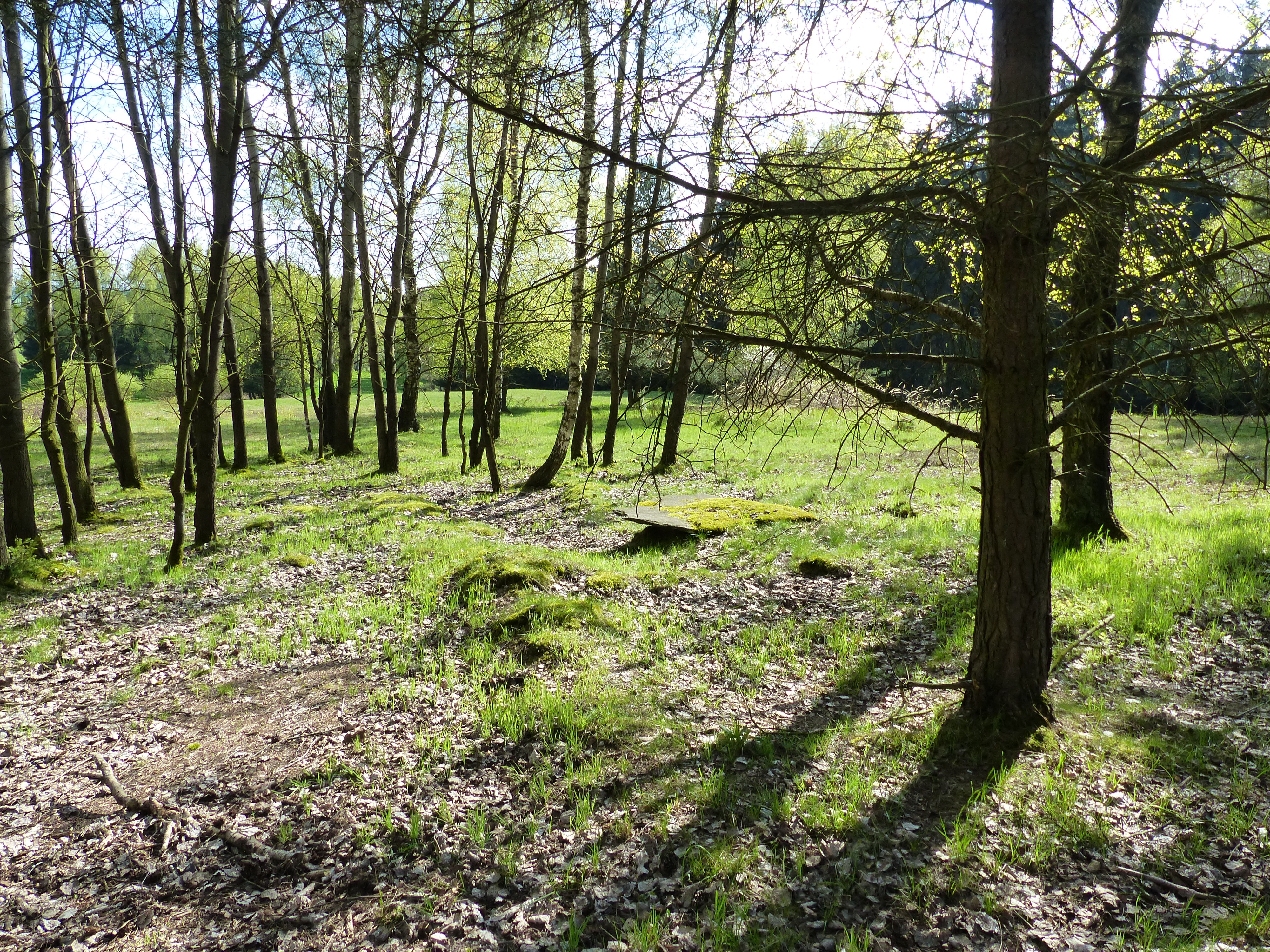 Bilderserie Wüstung Hasenreuth - Geländespuren, Hausbrunnen, Bäume an früheren Zufahrten